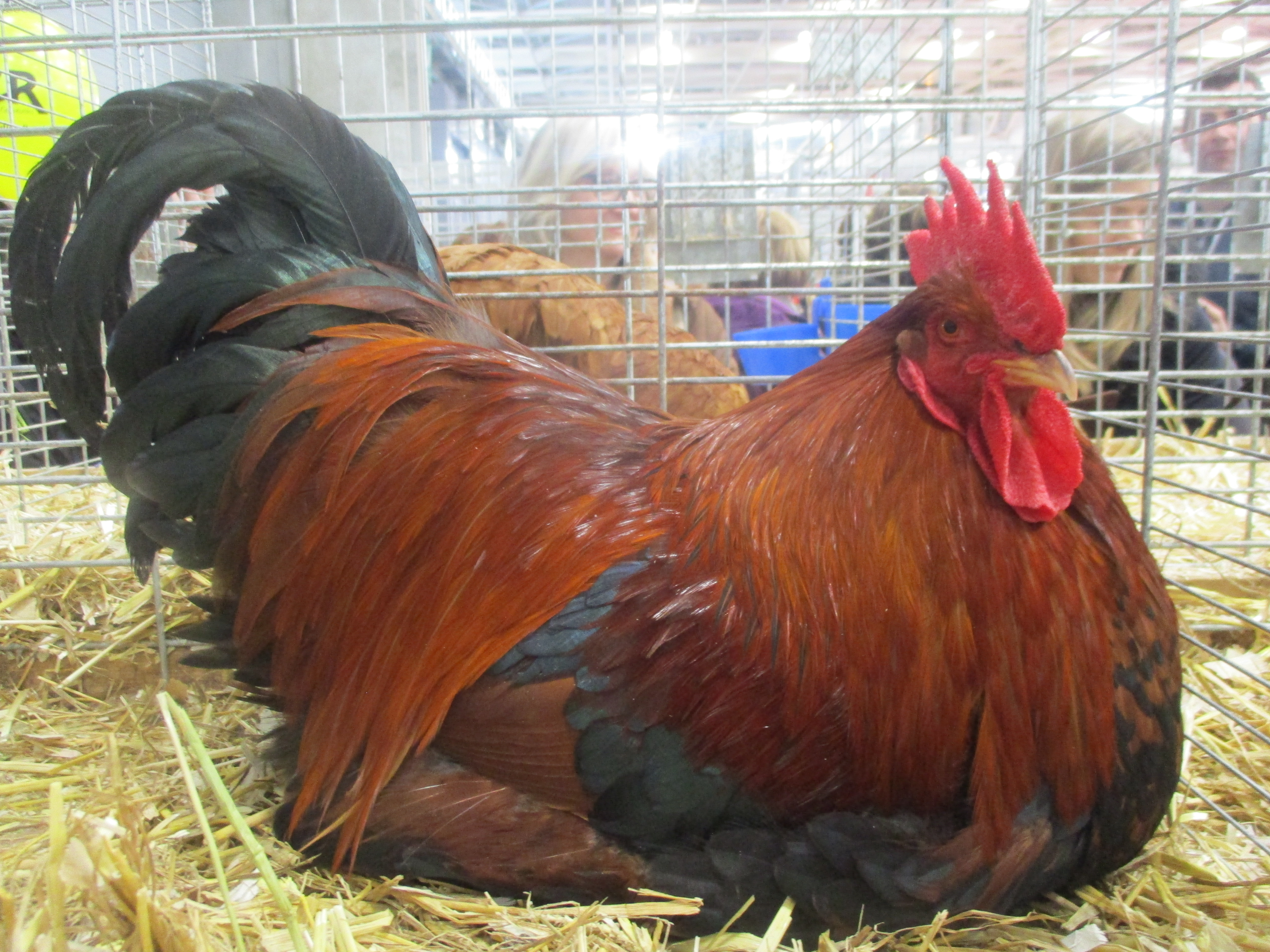 Coq welsumer.